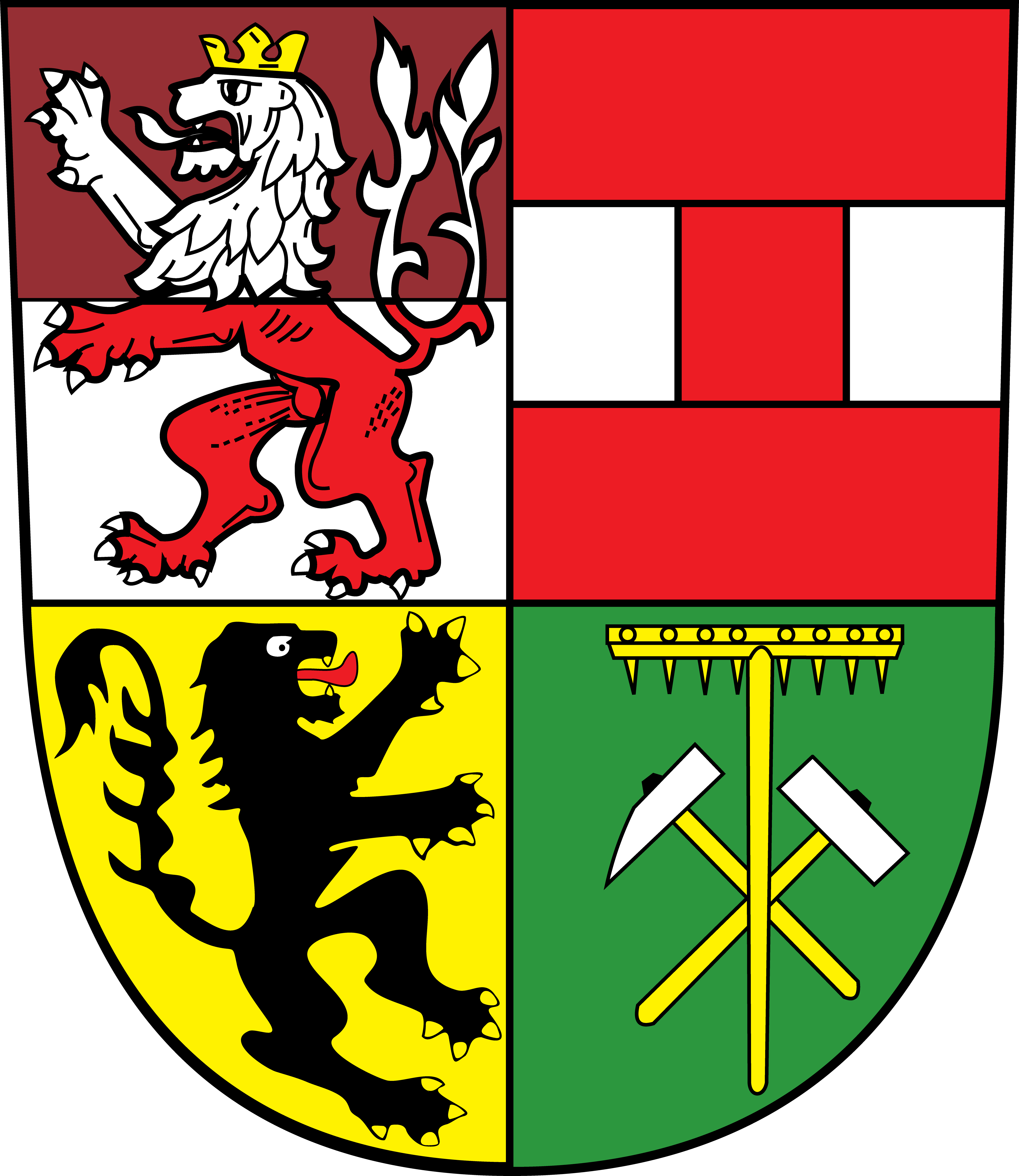 ZNAK MĚSTA